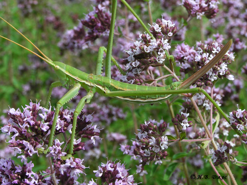 Балка Плоська, Лутугинський район, околиці с. Розкішне